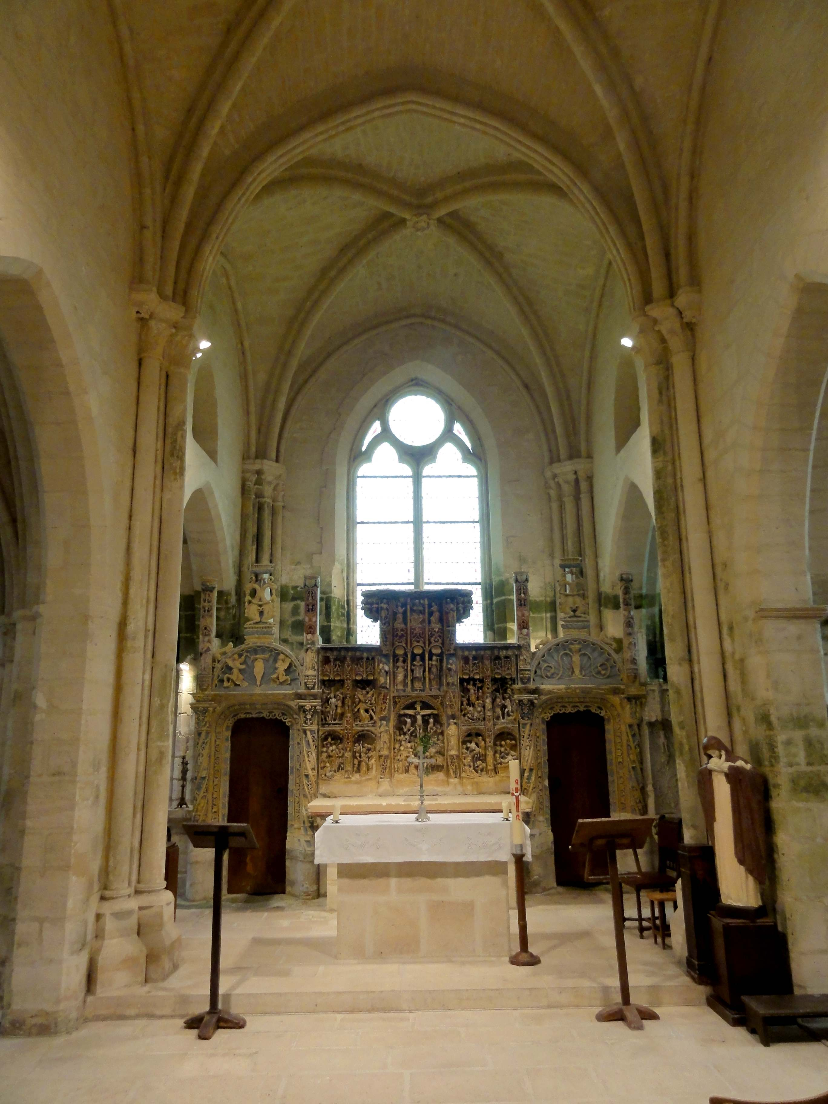 Intérieur de l'église - voir titre.